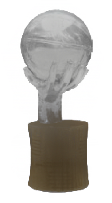 Trofeo de la Liga ACB.